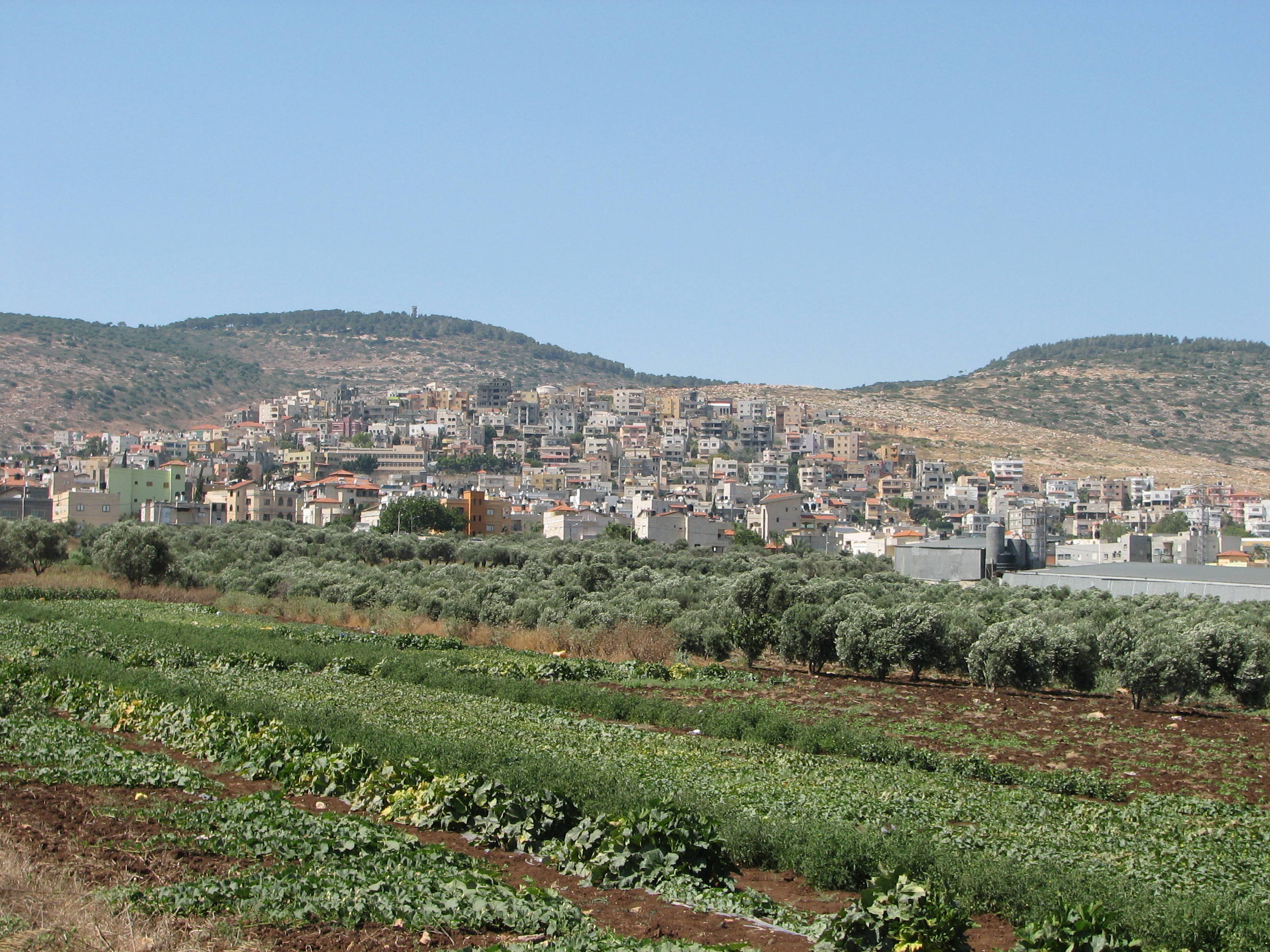 Tur'an, is an Israeli-Arab local council in the North District of Israel. It is located on Mount Tur'an near the main road from Haifa to Tiberias טורעאן, היא מועצה מקומית ערבית במחוז הצפון בישראל. היא הוכרזה כמועצה מקומית בשנת 1959., שוכנת על הר טורעאן על הדרך במובילה מחיפה לטבריה ליד צומת גולני מבט על הכפר לכיוון צפון